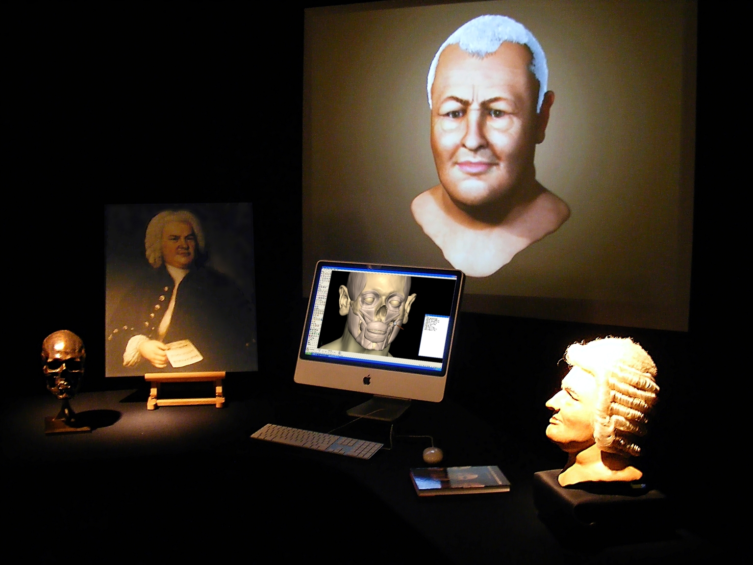 Bachhaus Eisenach, Sonderausstellung 2008 Bach im Spiegel der Medizin (mit Bach-Gesichtsrekonstruktion von Caroline Wilkinson, University of Dundee)